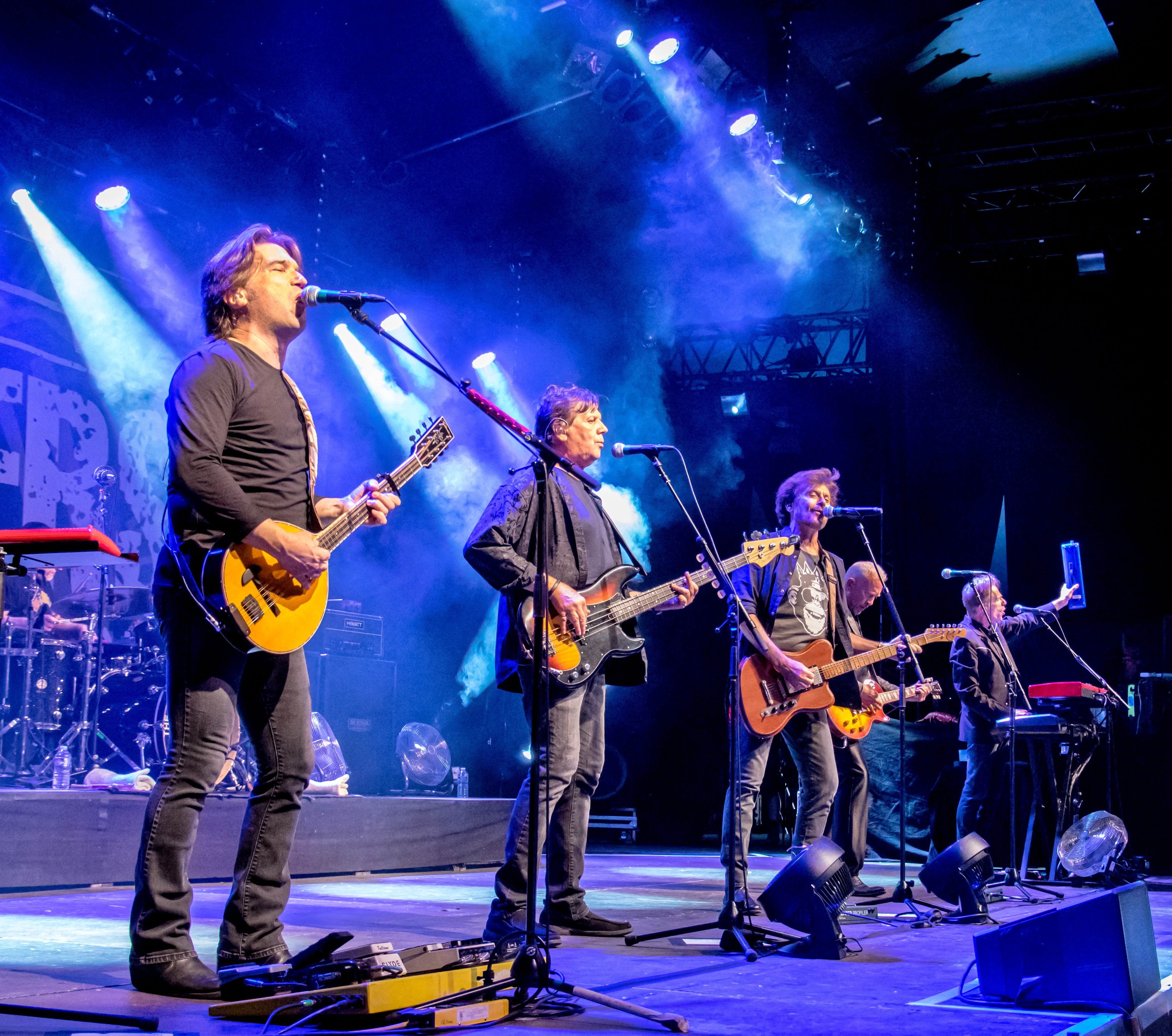 Bilder vom Zelt Musik Festival 2018 in Freiburg im Breisgau Auftritt The Hooters am 26. Juli 2018 im Zirkuszelt